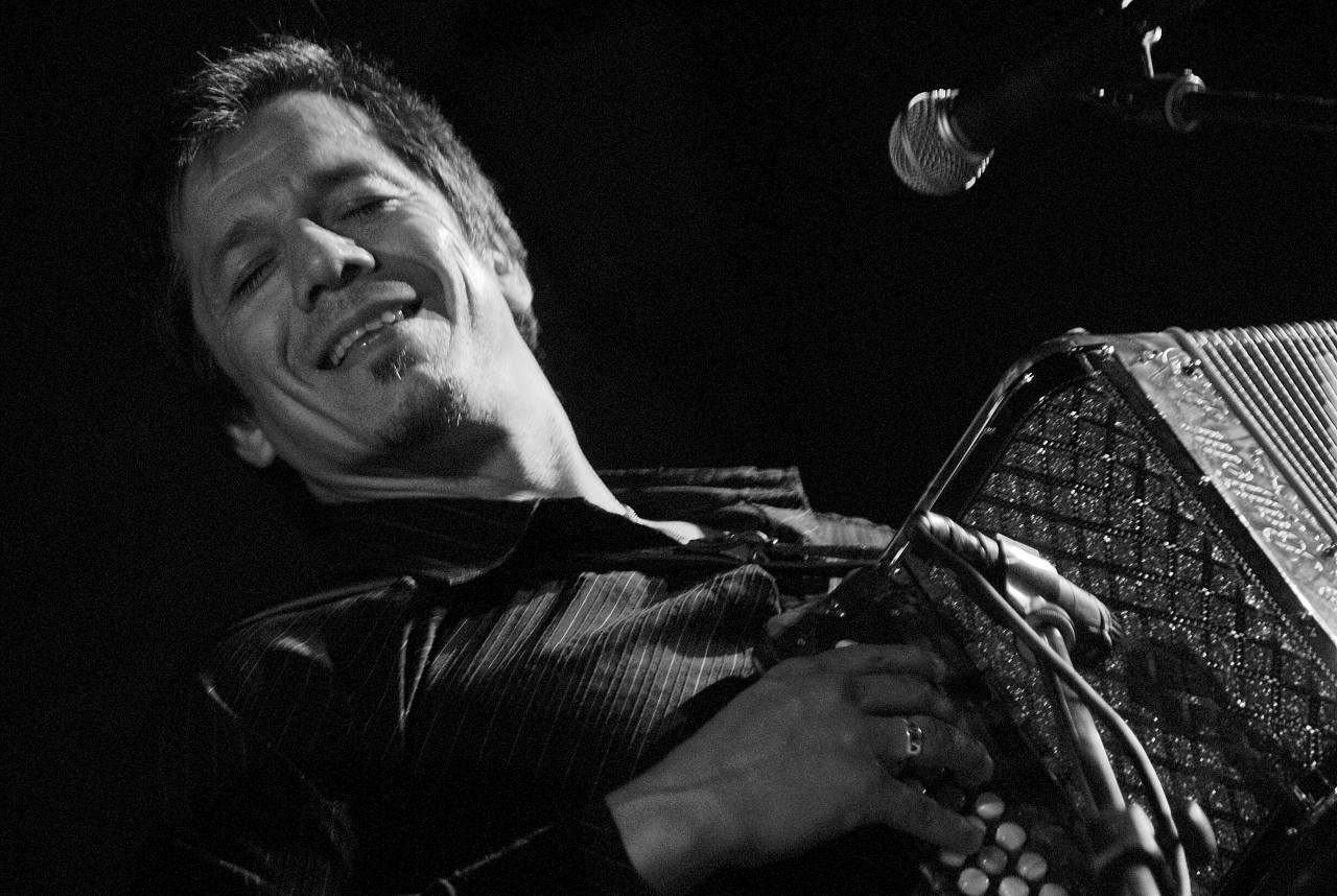 Un incredibile virtuoso dell'accordion